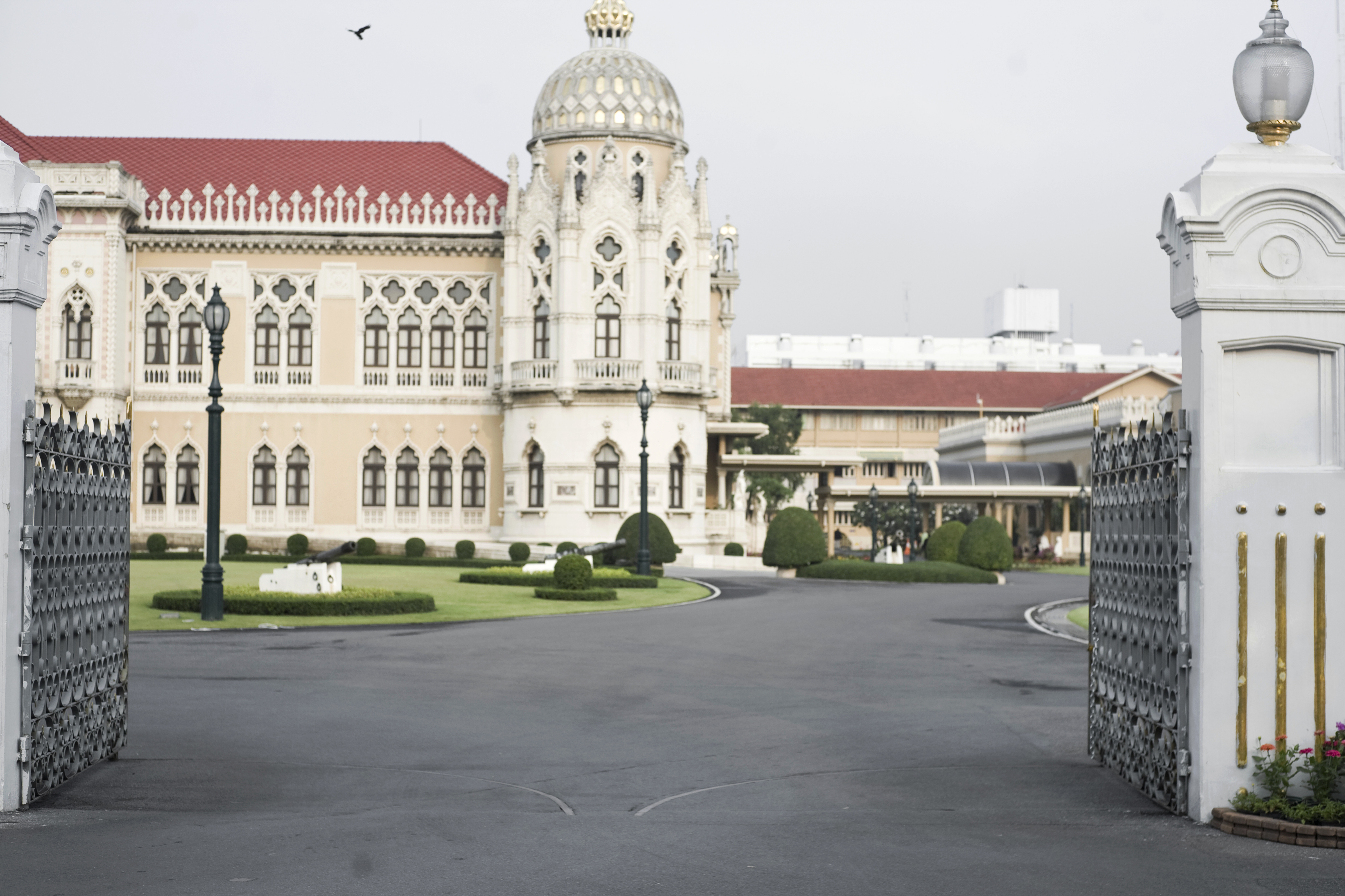 ตึกไทยคู่ฟ้า ทำเนียบรัฐบาล 8ตุลาคม2552 (The Official Site of The Prime Minister of Thailand Photo by พีรพัฒน์ วิมลรังครัตน์)